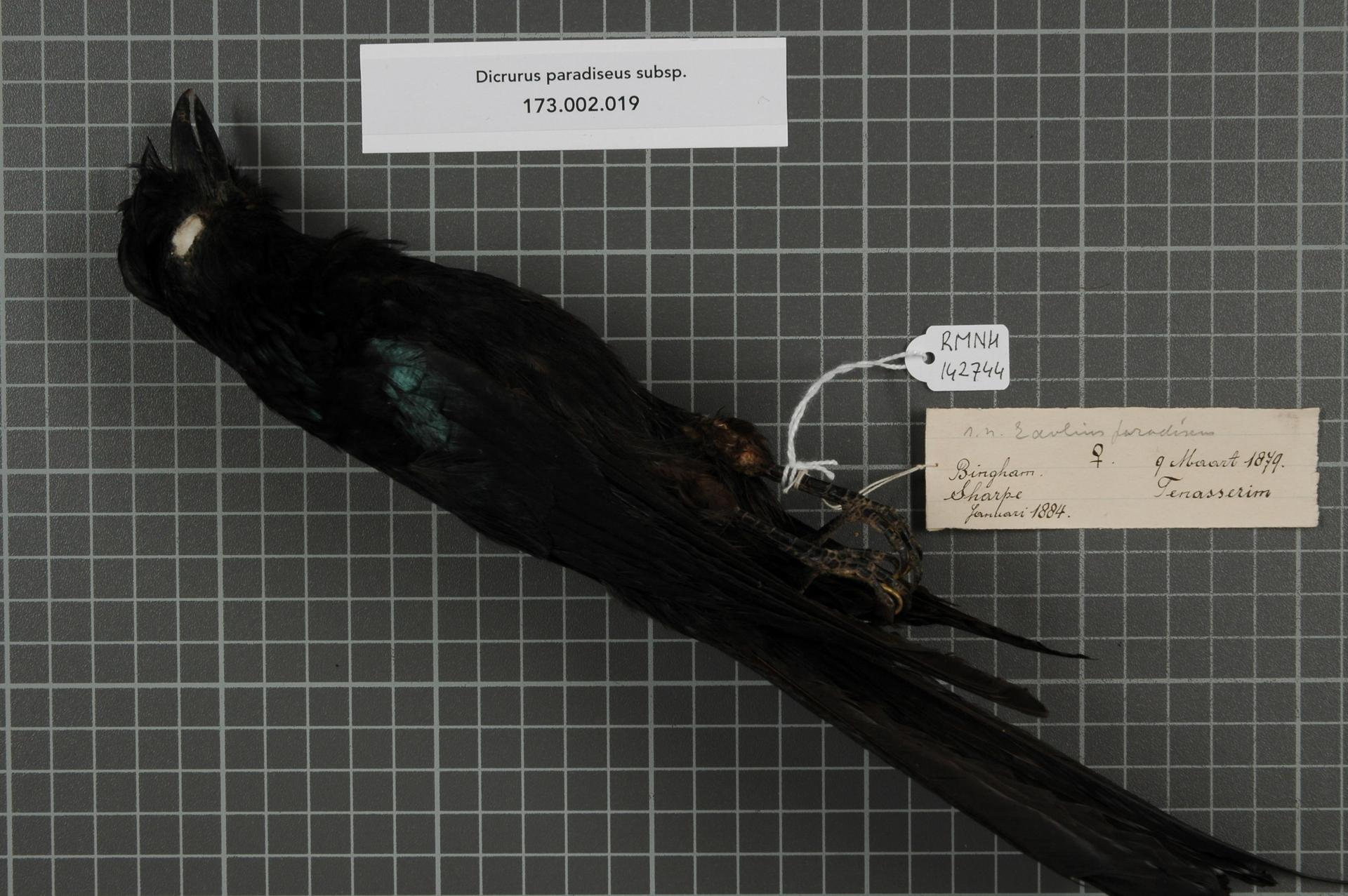 Dicrurus paradiseus subsp.